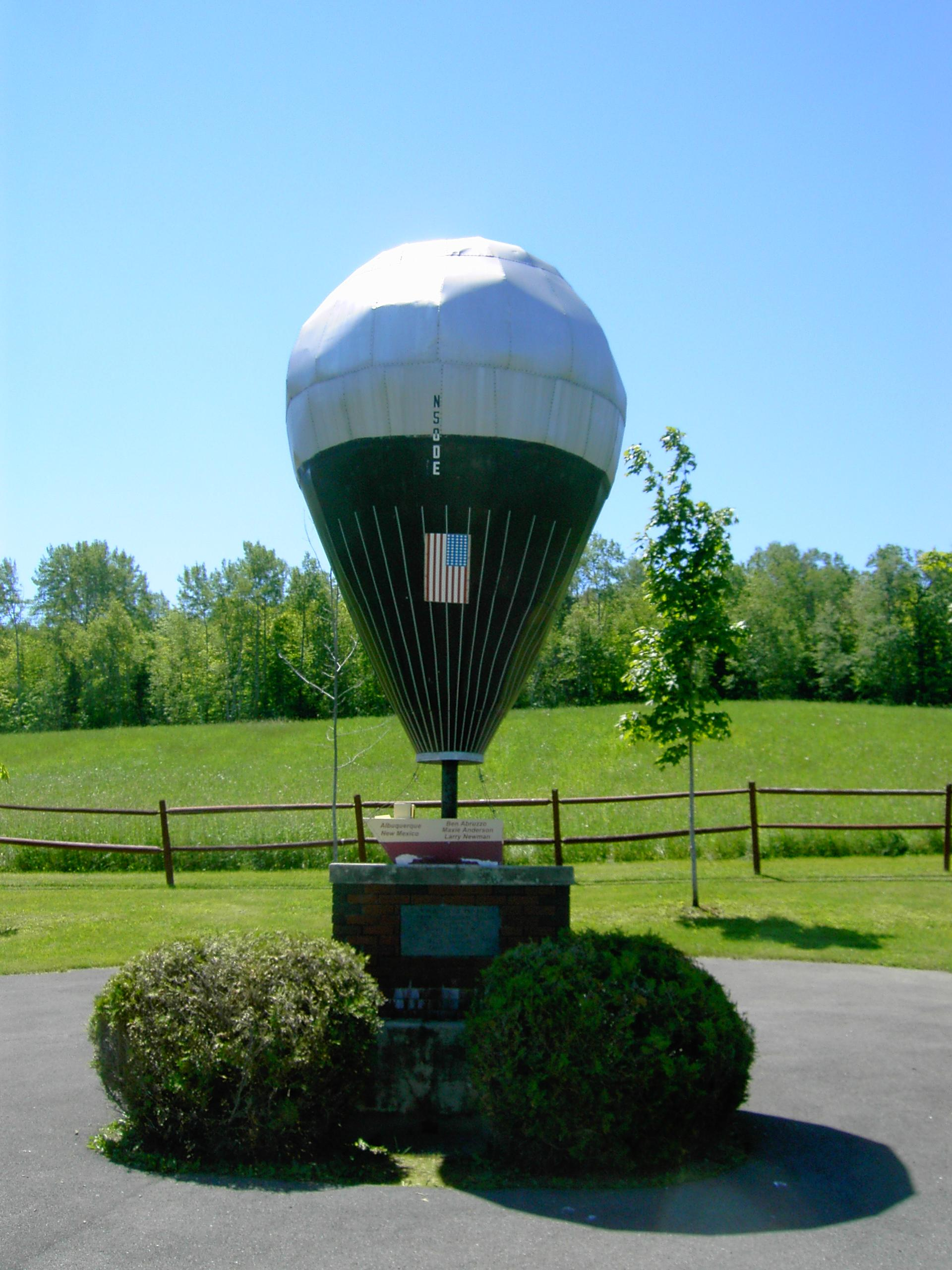 Double Eagle II Monument, Presque Isle, Maine Le 17 août 1978, les aérostiers américains Anderson, Abruzzo et Newman atterrissent en Normandie dans le bourg de Miserey.